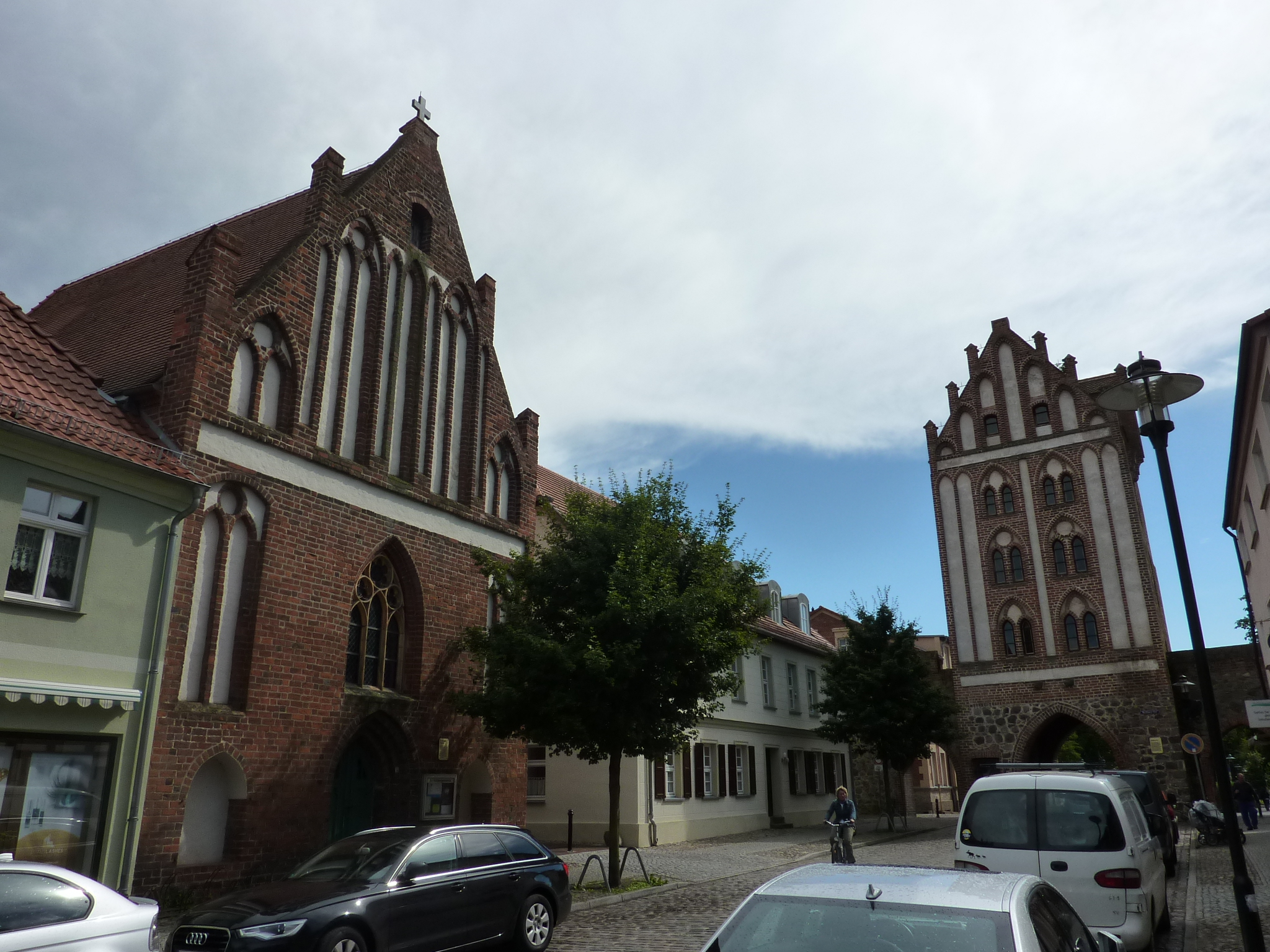 St Georgenkapelle (Templin)